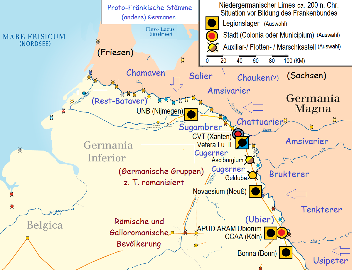 Proto-Fränkische Stämme am Niedergermanischen Limes etwa 200 n. Chr.